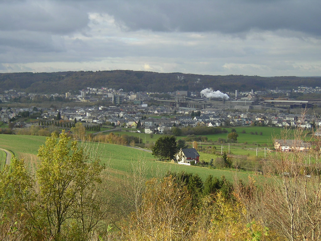 Uewerkuer. Allgemenges zum Bild: Dëst Bild weist déi Déifferdenger Uertschaft Uewerkuer (Am Detail: d'Quartiere Woiwer a Fussbann) an den Zentrum vu Déifferdeng-Stad. Z'erkennen ass am Hannergrond d'Stolwierk vun der ARBED.